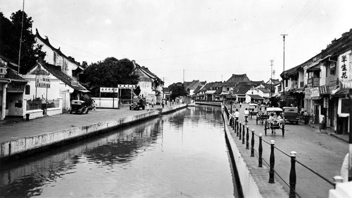 Repronegatief. Kanaal Kali Baroe, Djakarta